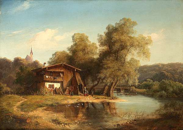 Die rheinlandsiche Landschaft